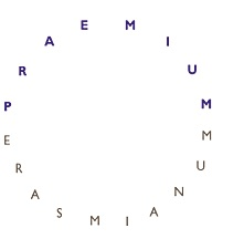 Logo des Erasmuspreises